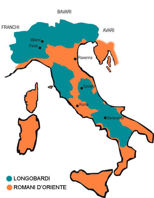 Il regno dei Longobardi al tempo di Alboino autore: Utente:Castagna Contents 1 Licensing 2 Licensing 3 Original upload log 4 Original upload log Licensing Categoria:Immagini sui longobardi